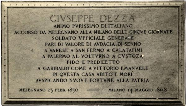 Lapide commemorativa del Generale Giuseppe Dezza (1830-1898)